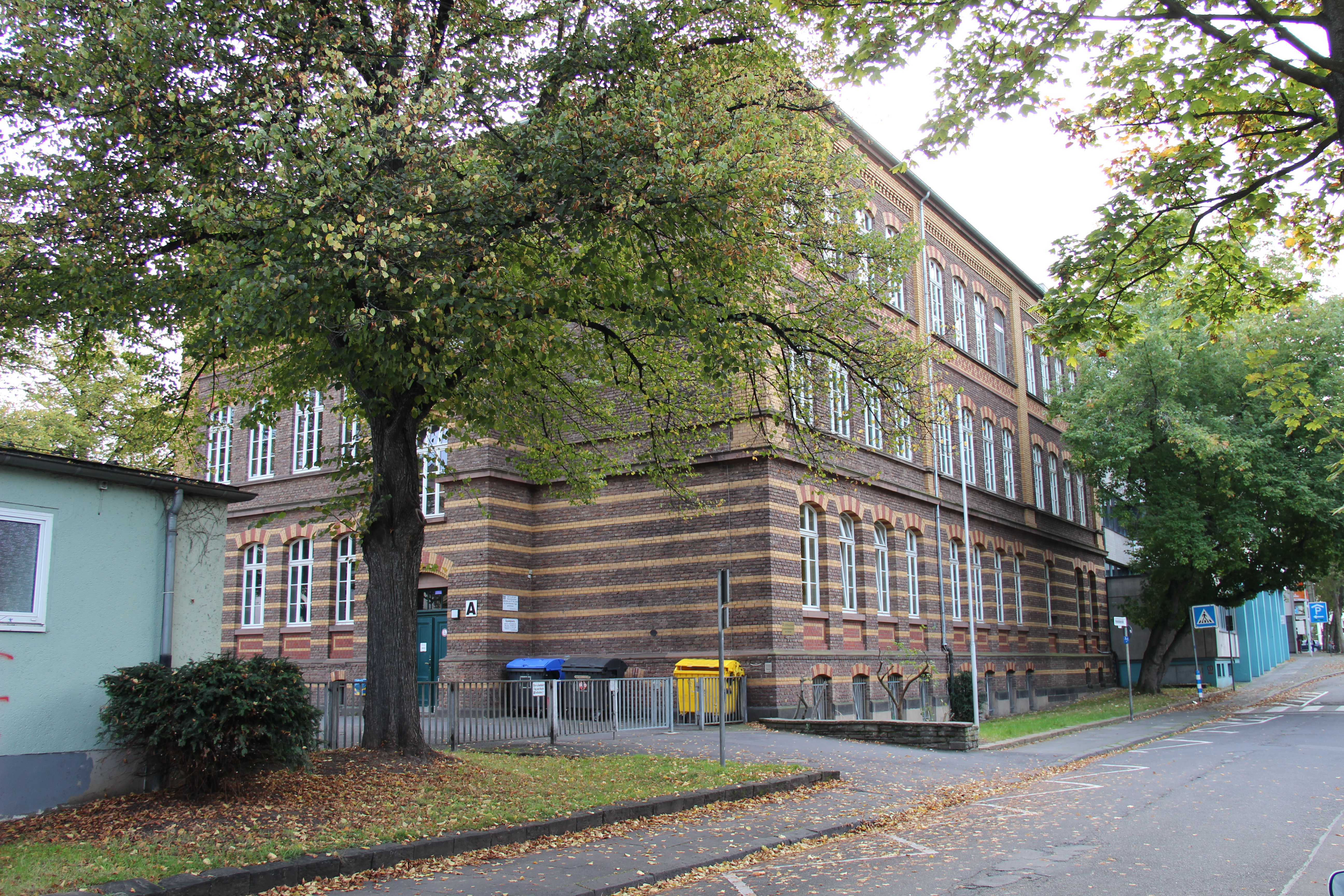 Denkmalgeschützte Stiftsschule, Theaterstraße 60, Bonn-Zentrum